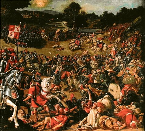 Lienzo de autor desconocido del siglo XVII que representa la batalla del Salado, que se libró en 1340 y en la que las tropas cristianas de los reyes Alfonso XI de Castilla y Alfonso IV de Portugal derrotaron aplastantemente a los ejércitos musulmanes del rey de Granada y de los Benimerines.